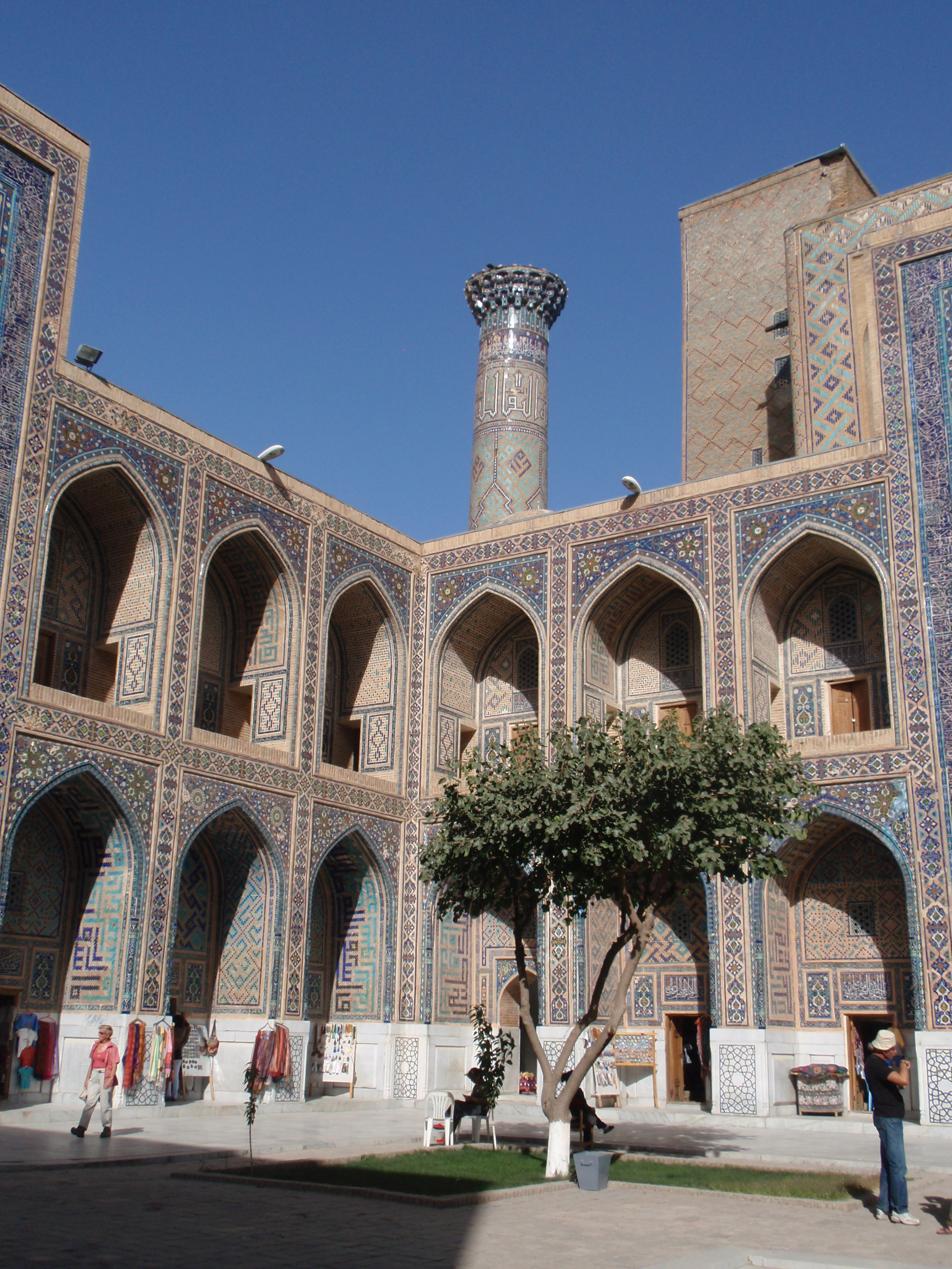 Innenhof der Ulugbek-Madrasa, der westlichsten und ältesten (1417–1420) der drei Madrasas am Samarkander Registan.